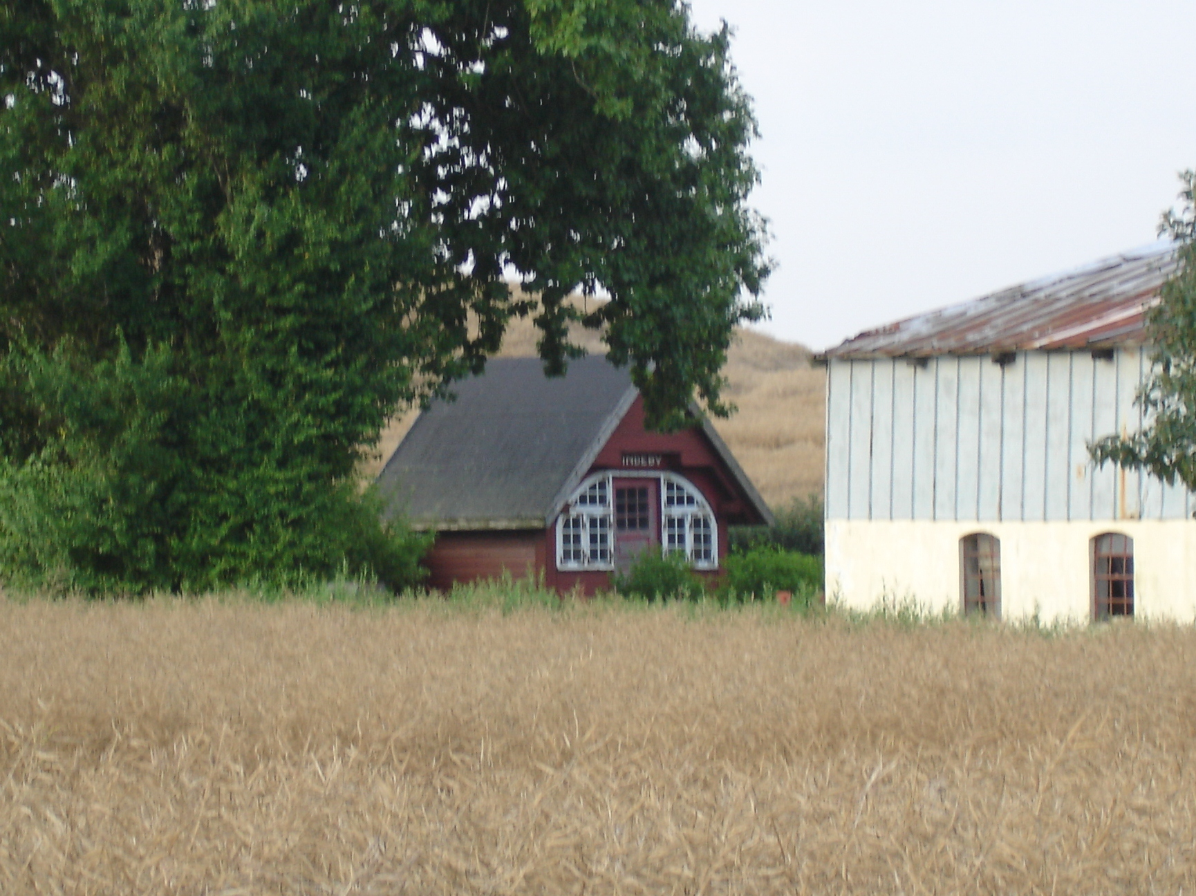 Vindebys oprindelige trinbrætskur af træ er restaureret som lysthus på Vesteregnsvej 4, Humble